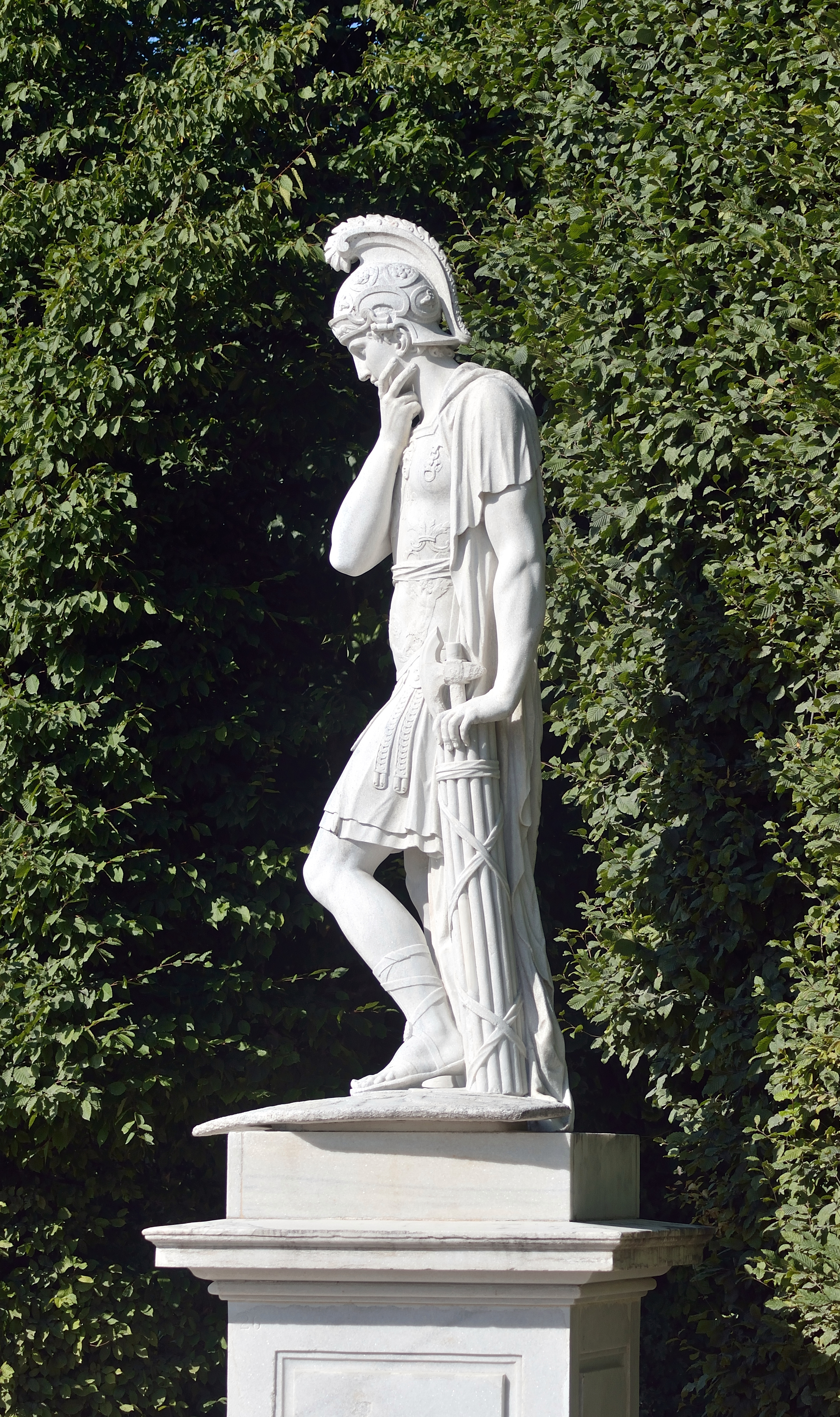 Wien, Schlosspark Schönbrunn, Figuren aus Sterzinger Marmor am Großen Parterre, 1773–1780; Nr. 26: Fabius Cunctator (Quintus Fabius Maximus Verrucosus). Bildhauer: Joseph Baptist Hagenauer